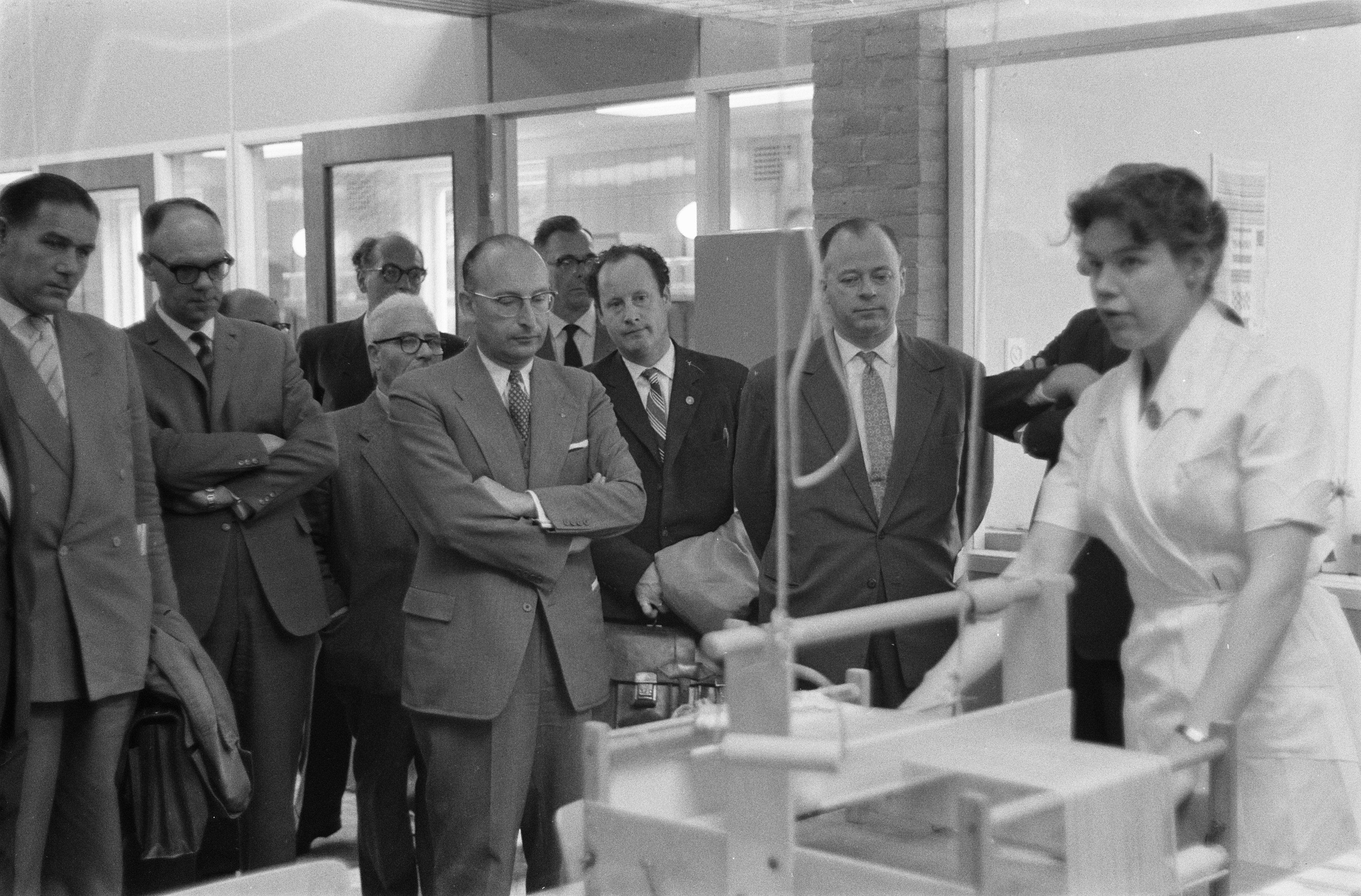 Collectie / Archief : Fotocollectie Anefo Reportage / Serie : [ onbekend ] Beschrijving : Wethouder van Gezondheid en Ziekenhuiswezen mr. R. van de Bergh opent in het Oosterpark te Amsterdam het nieuwe revalidatiecentrum Datum : 16 mei 1960 Locatie : Amsterdam, Noord-Holland Trefwoorden : openingen, revalidatiecentra, wethouders Persoonsnaam : Bergh R van de Fotograaf : Pot, Harry / Anefo Auteursrechthebbende : Nationaal Archief Materiaalsoort : Negatief (zwart/wit) Nummer archiefinventaris : bekijk toegang 2.24.01.05 Bestanddeelnummer : 911-2594